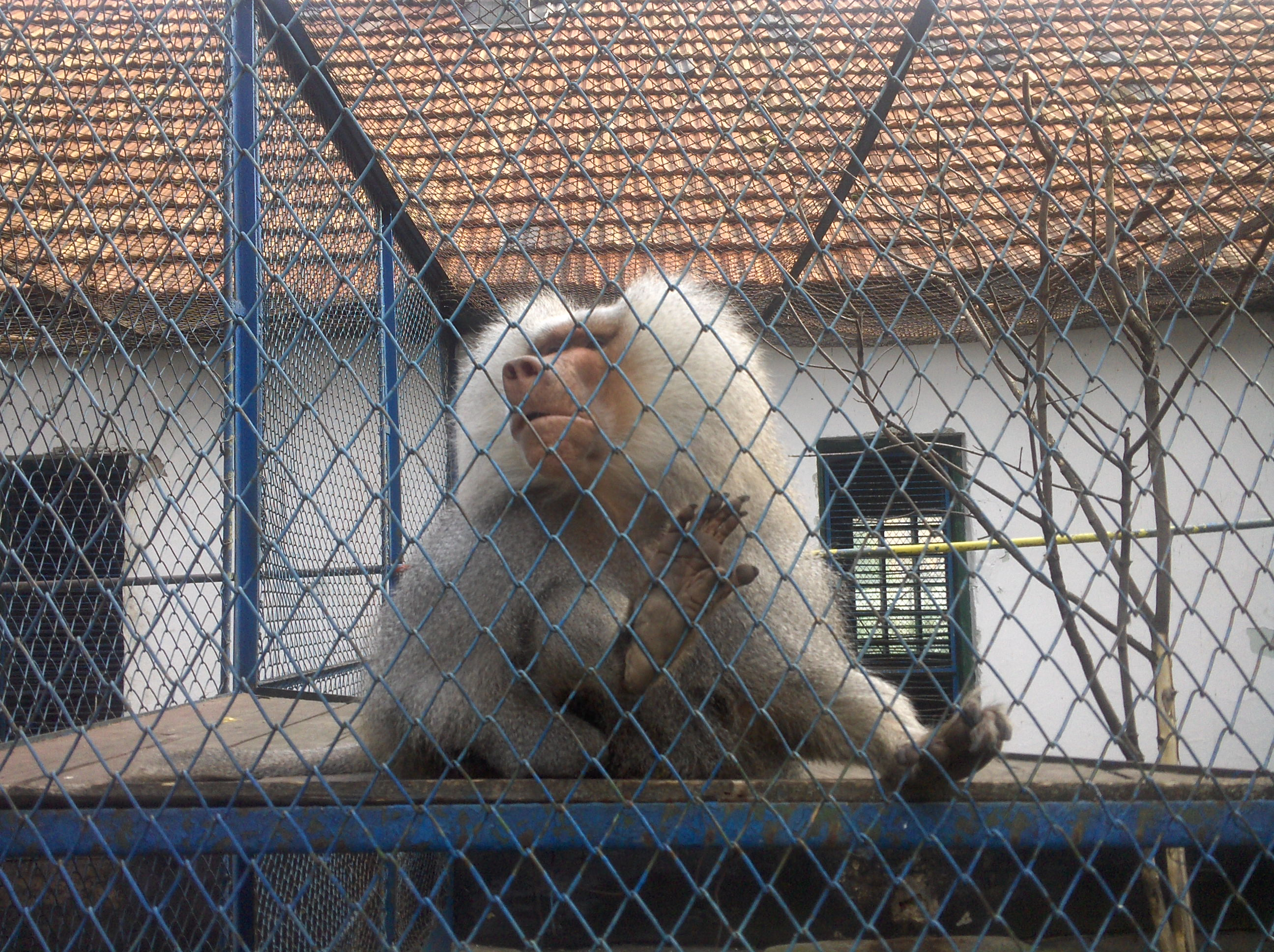 Mono en zoo de Rădăuţi